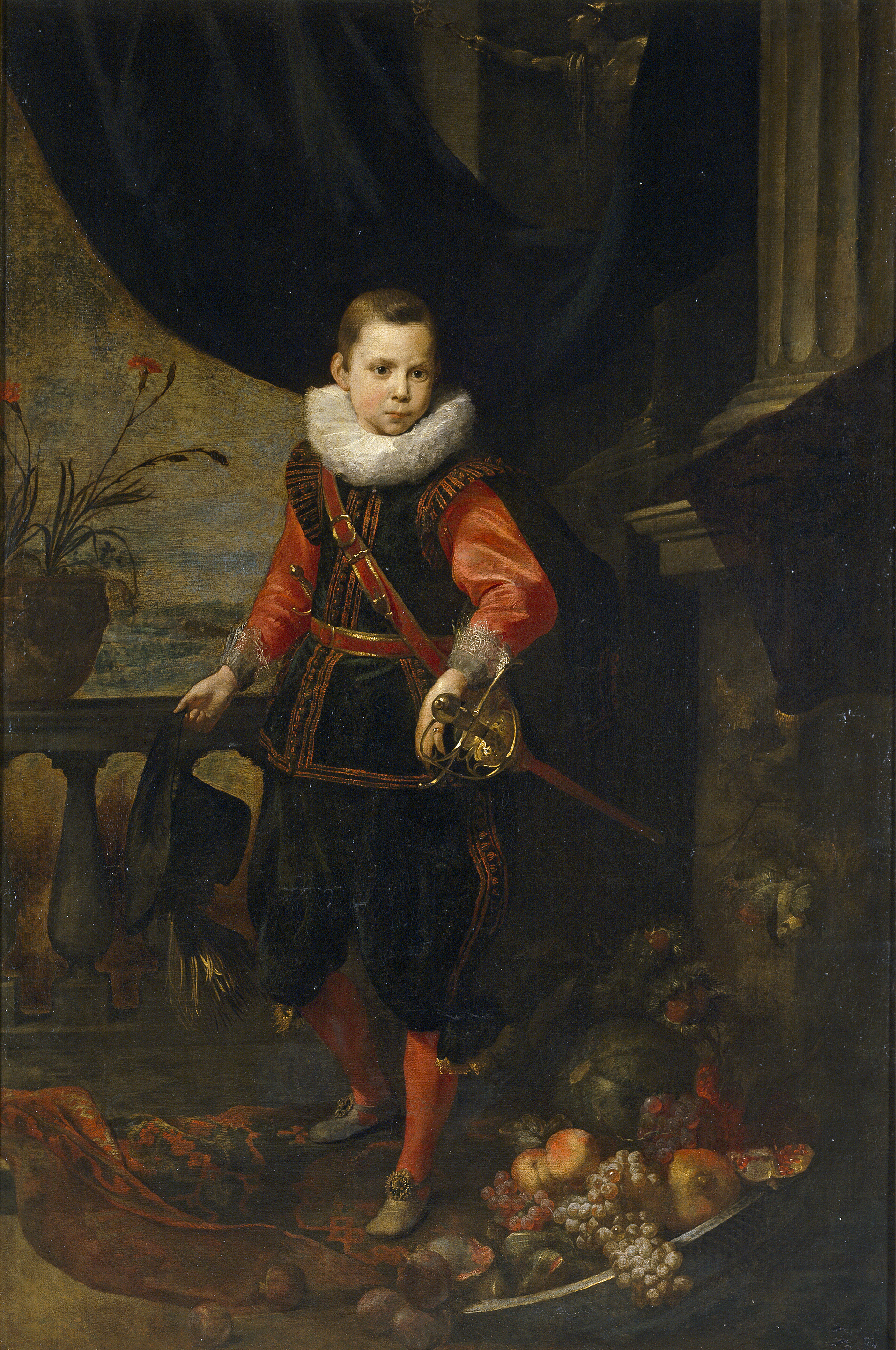 Retrato de un jovenlabel QS:Les,"Retrato de un joven"